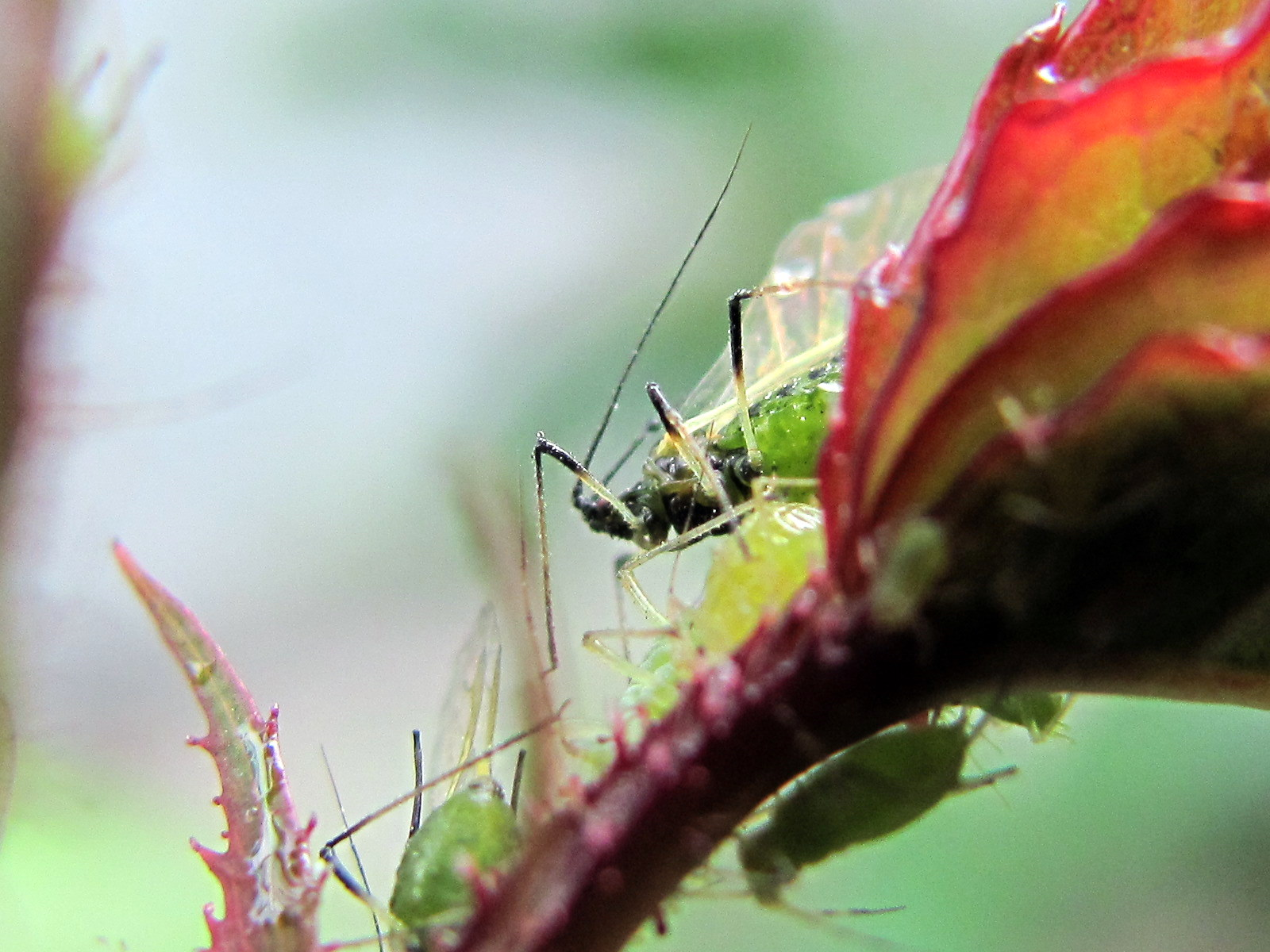 metamorfosis de pulgón